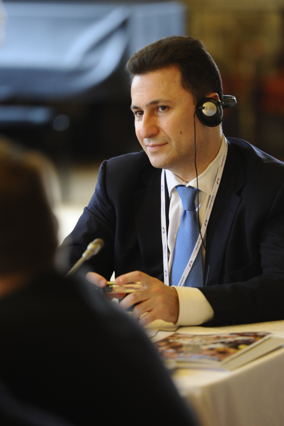 Nikola Gruevski